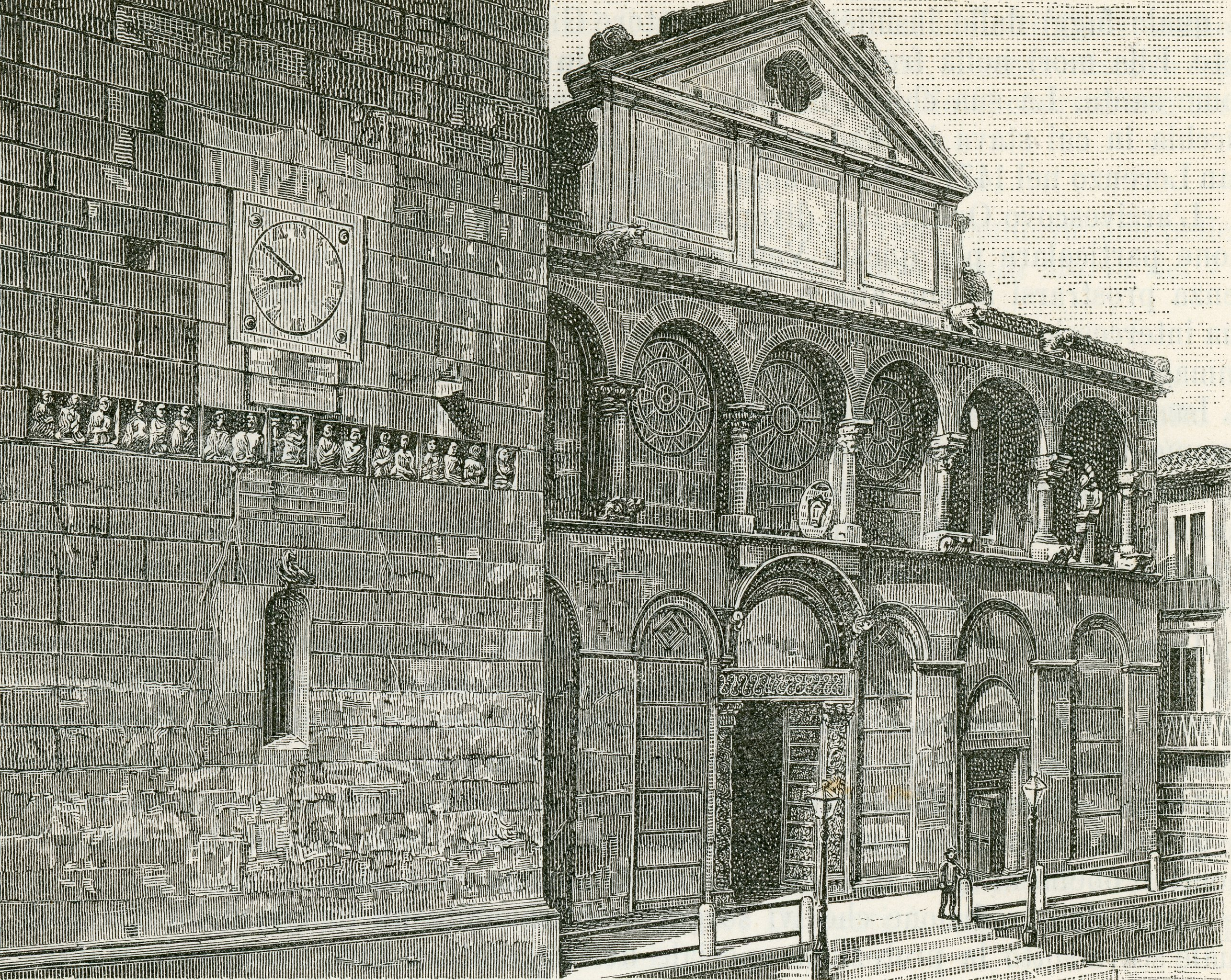 Benevento: facciata del Duomo (incisore anonimo 1898).